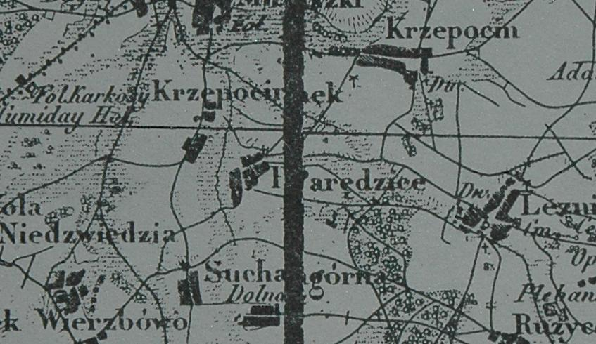 Parądzice na Topograficznej Karcie Królestwa Kongresowego